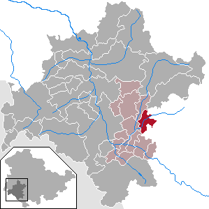 Dillstädt in Thuringia - District Schmalkalden-Meiningen